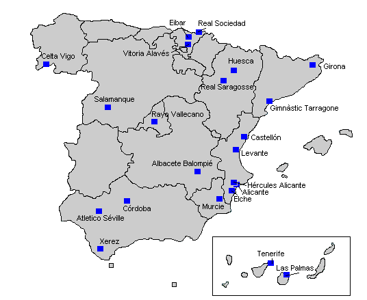 Liste des clubs participants à la Segunda Division 2008-2009